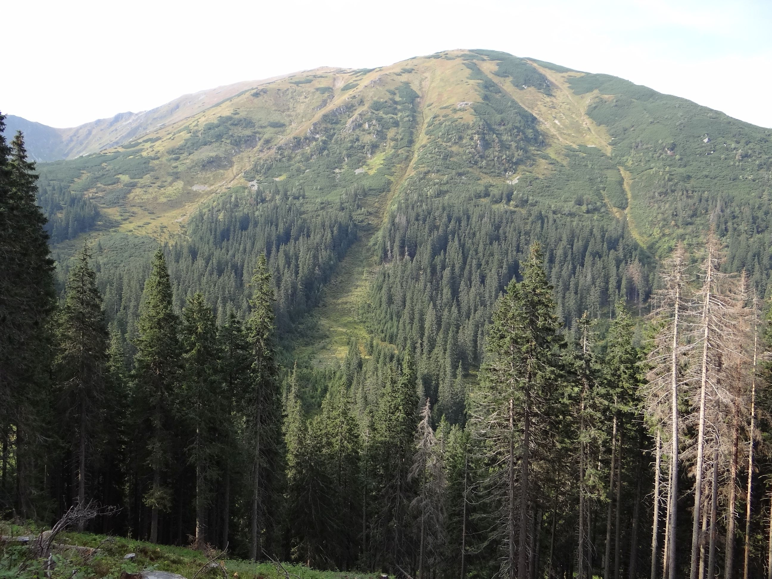 Hotarz